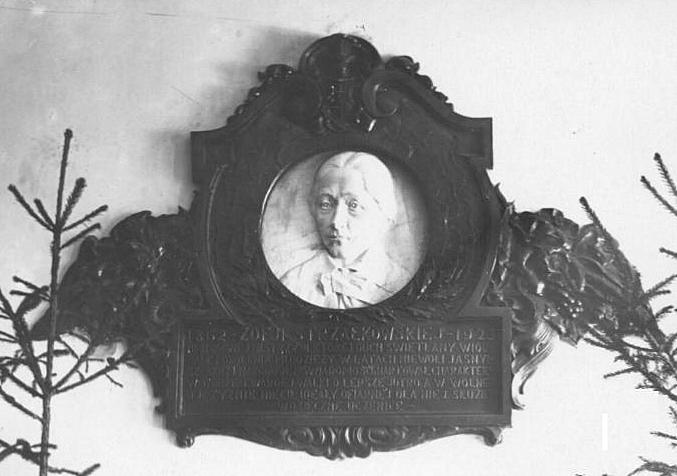 Tablica upamiętniająca Zofia Strzałkowską, ustanowiona w 1924 w gmachu Zakładów Naukowych jej imienia we Lwowie.